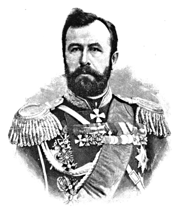 Aleksey Kuropatkin